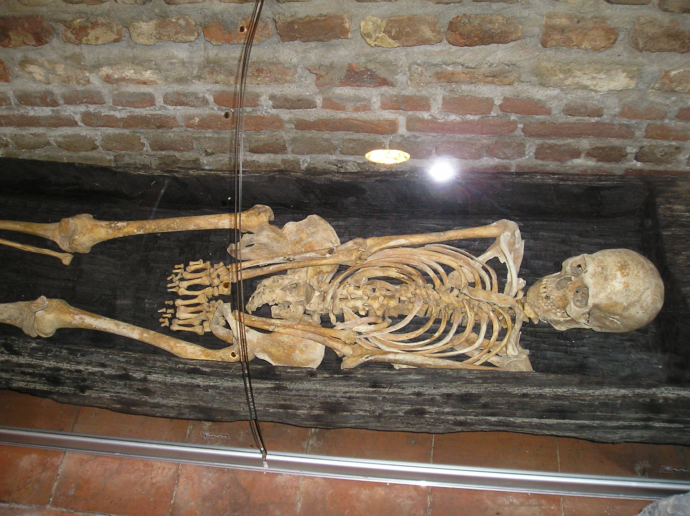 Grave - Kelder De Wit